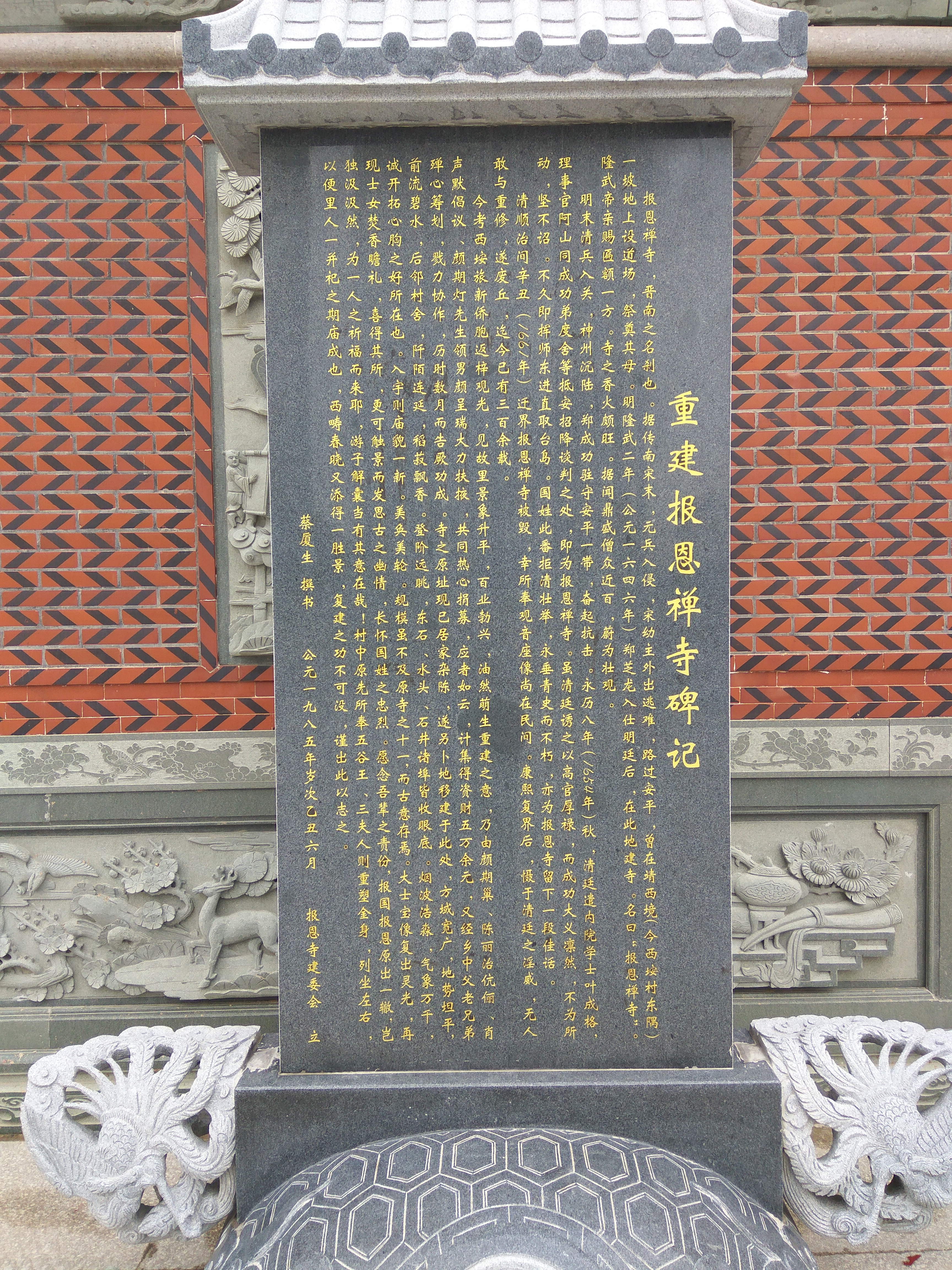 重修报恩寺记